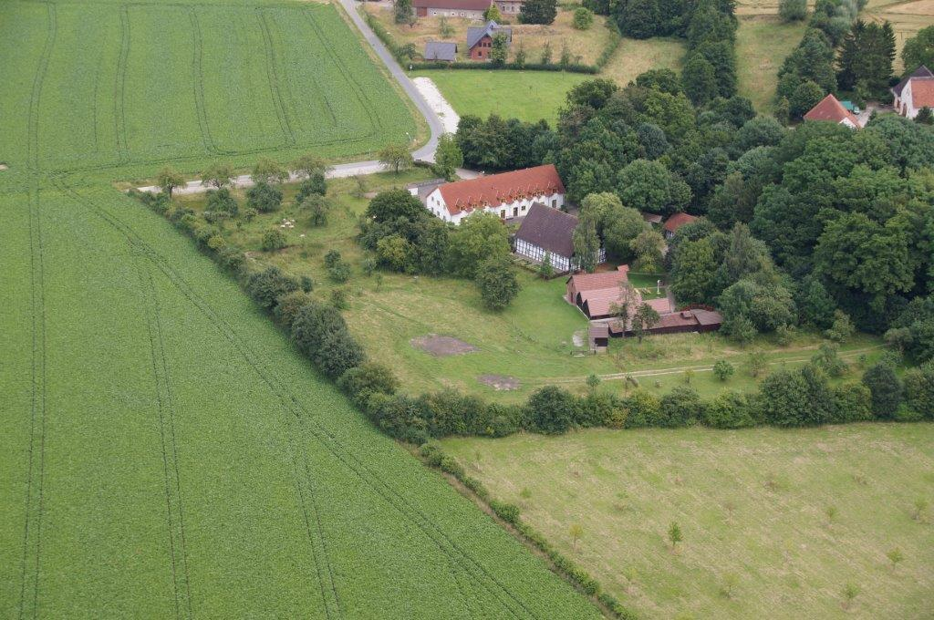 Luftbild vom Heimathof Leopoldshöhe